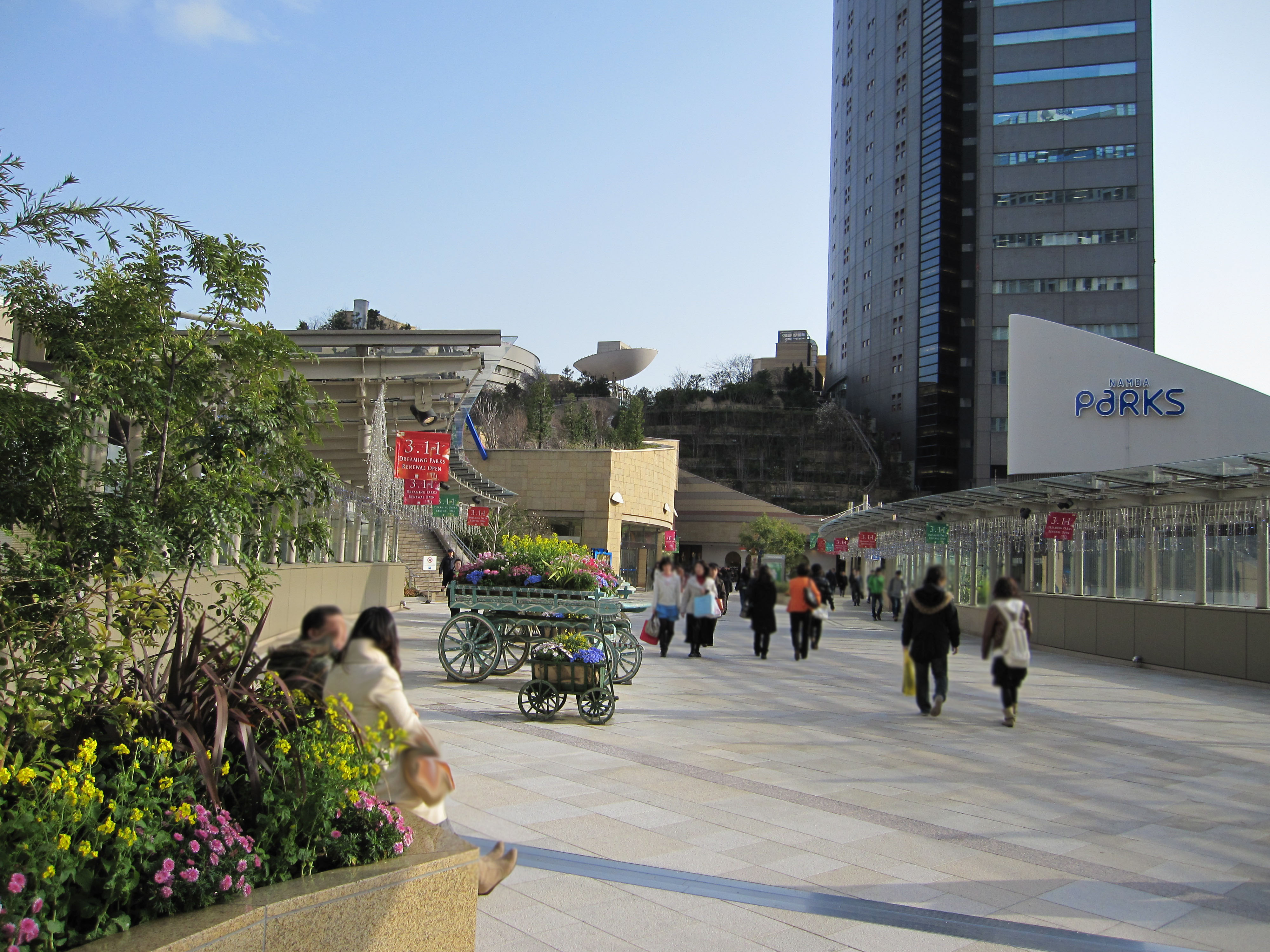 なんばパークス2F連絡口